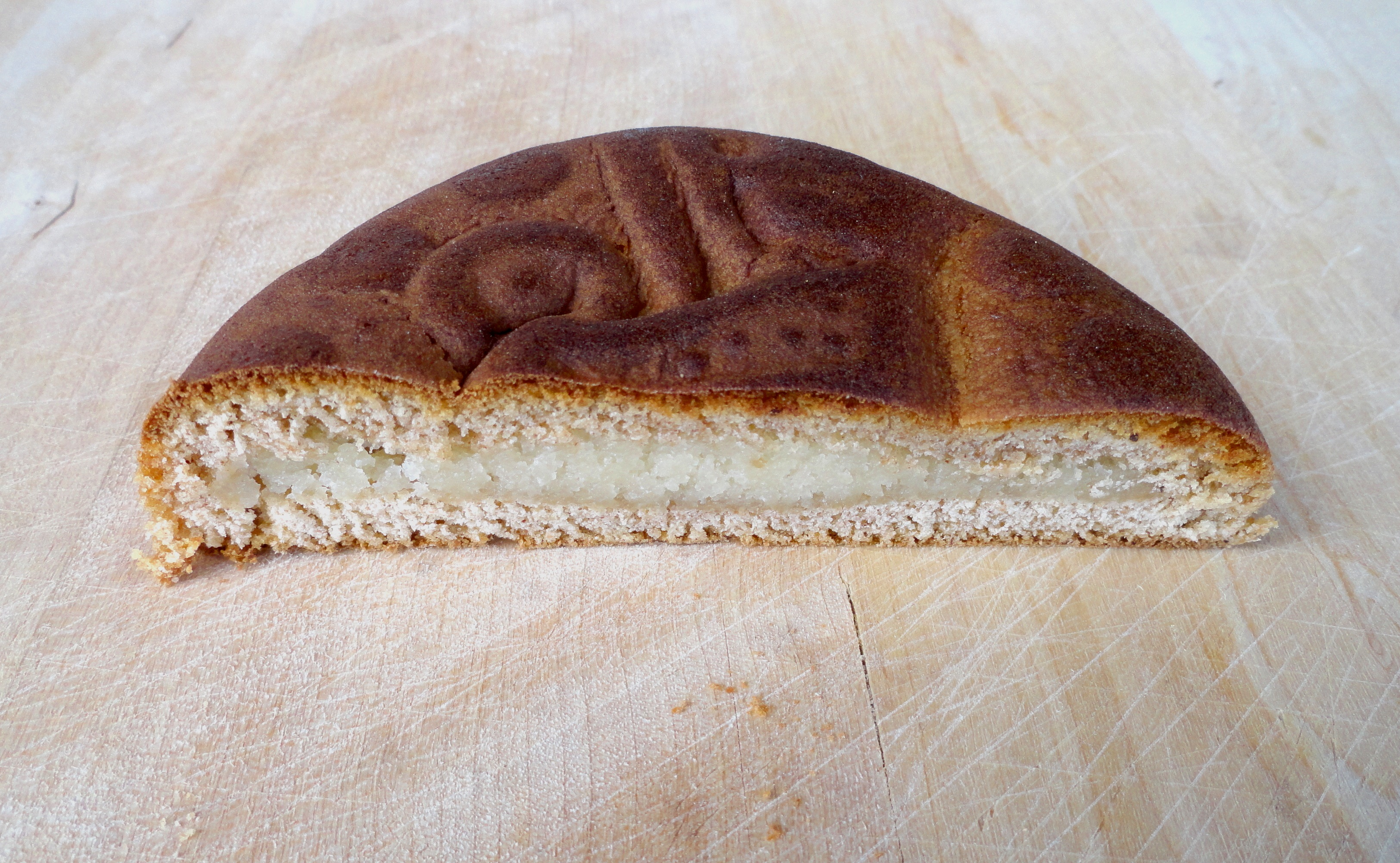 Appenzeller Biber mit Mandelfüllung; Durchmesser ca. 9 cm